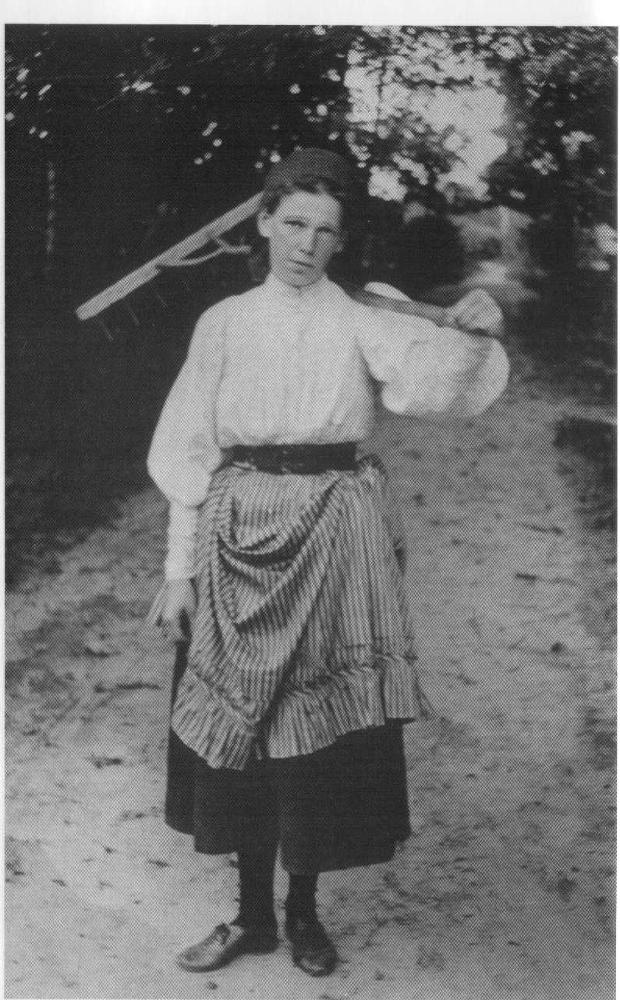 Мария Львовна Толстая. Фотография П. И. Бирюкова. Ясная Поляна, 1895 г.